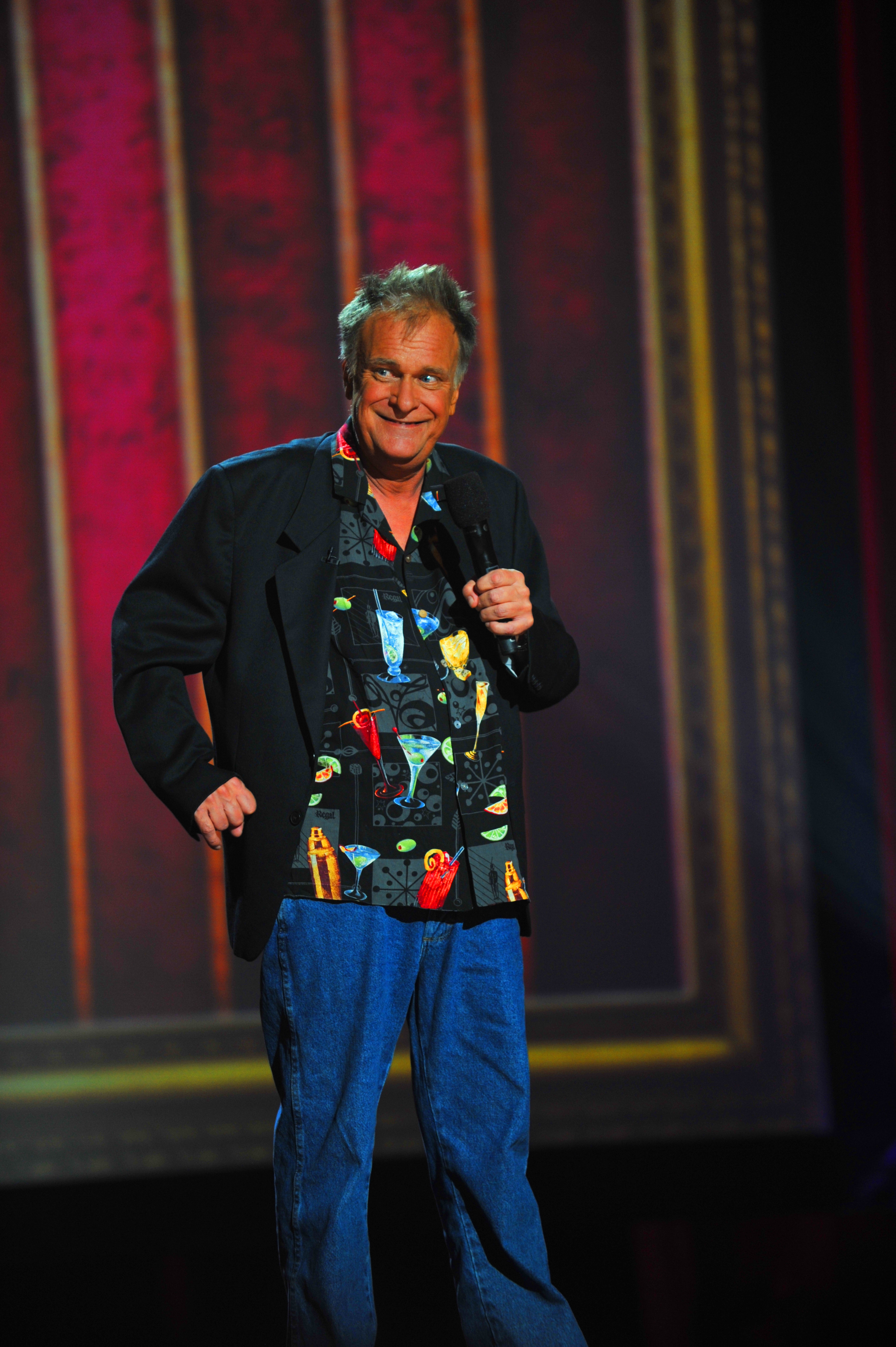 John Fox